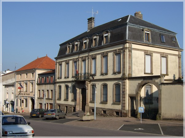 Vue de la Sous-Préfecture et de la Mairie de Château-Salins